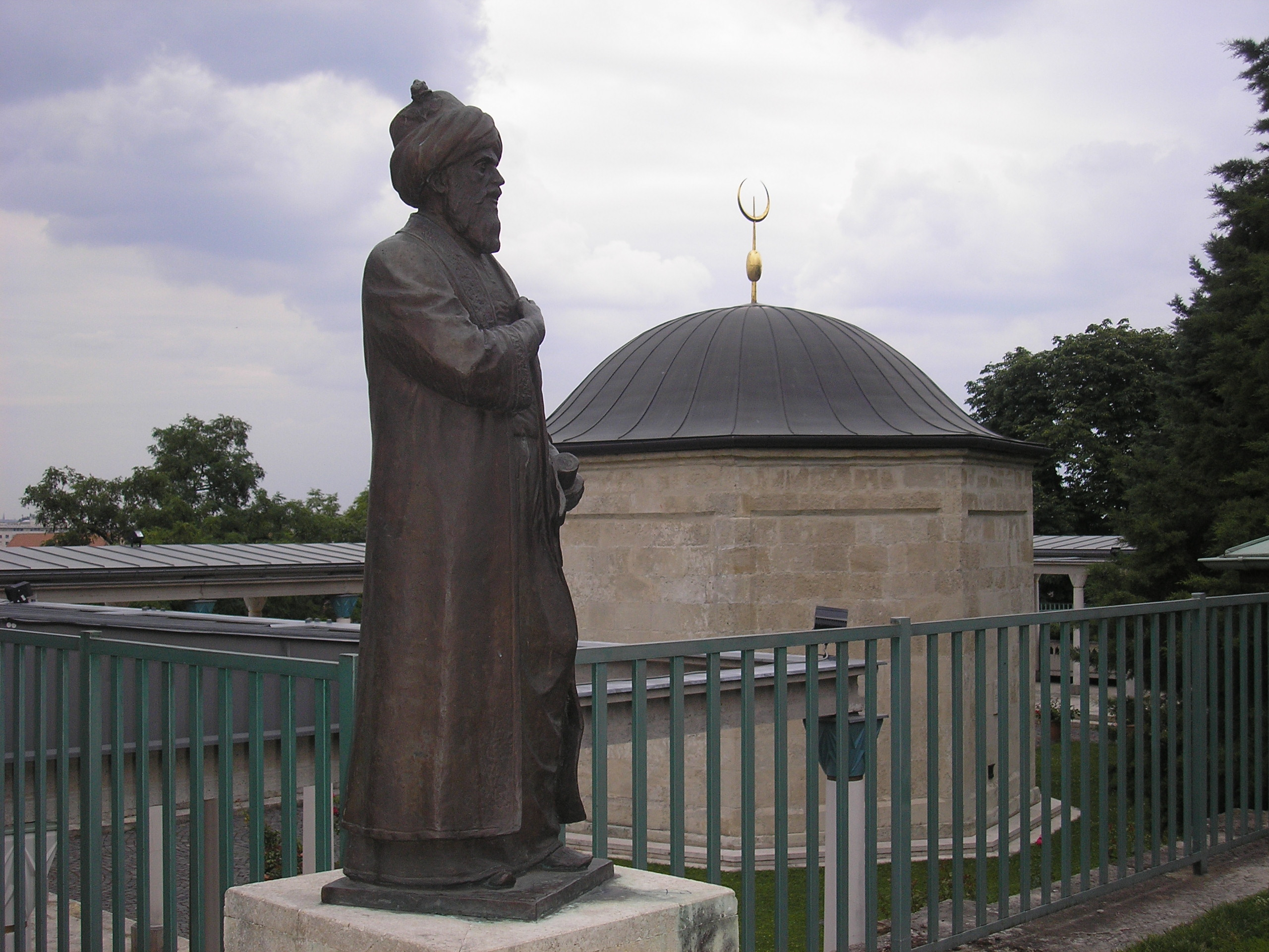 Statue von Gül Baba auf dem Rosenhügel in Buda